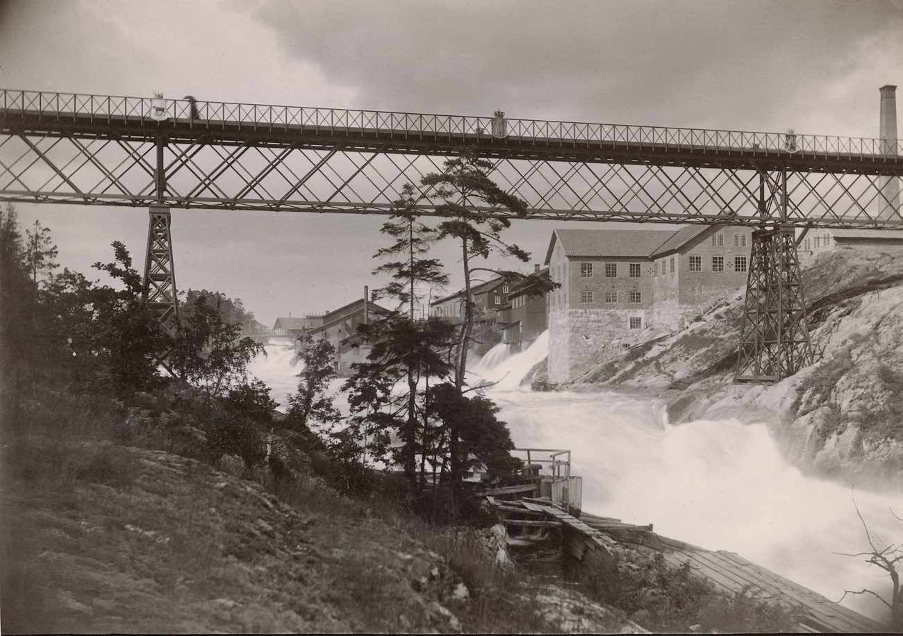 DIG3101. Trollhättan. Stora bron med fallen. Göta Älv. Fotografiet är skänkt till Tekniska museet från Svenska Turistföreningen.